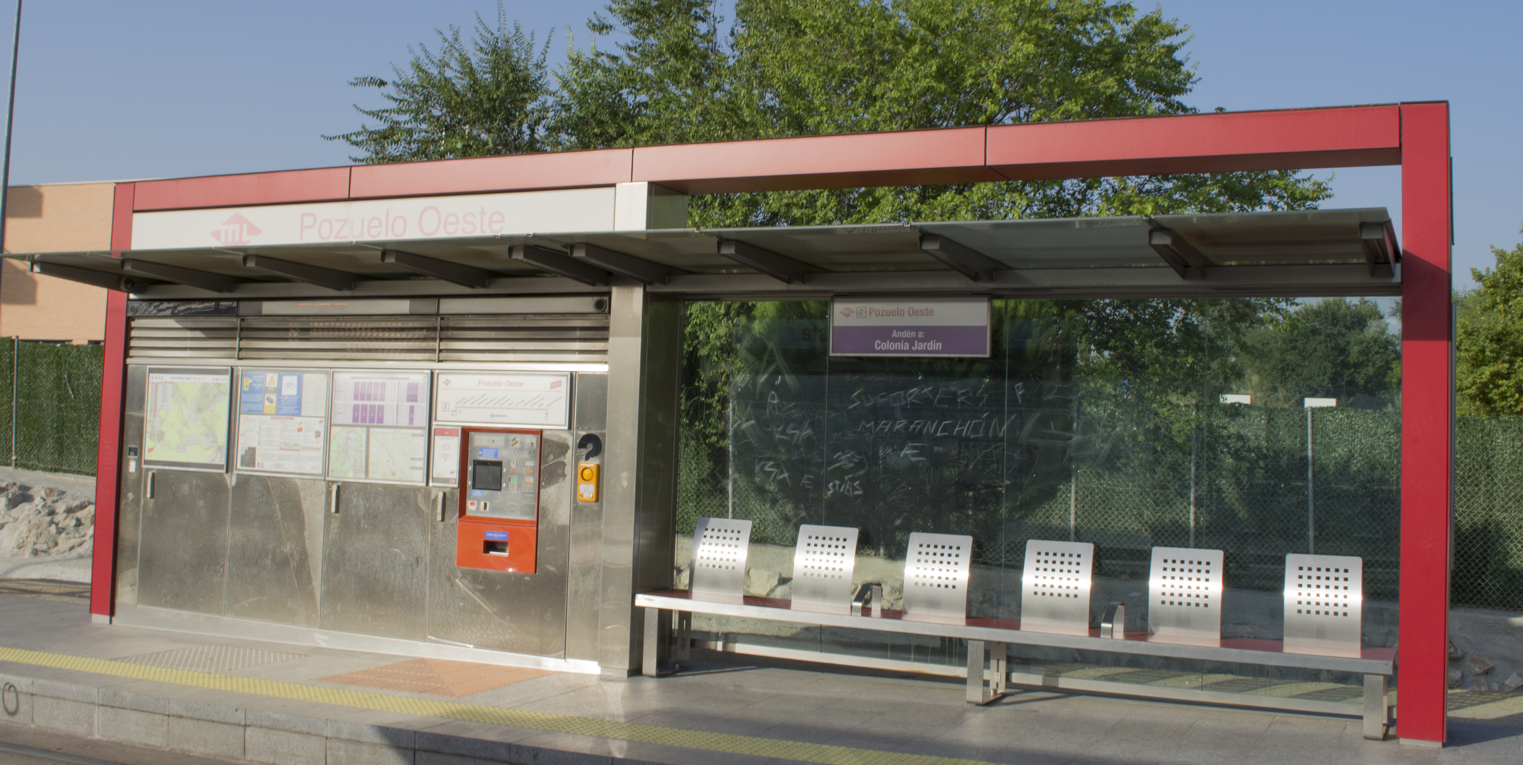 Andén de la estación de Pozuelo Oeste, de Metro Ligero Madrid, en dirección a Colonia Jardín.